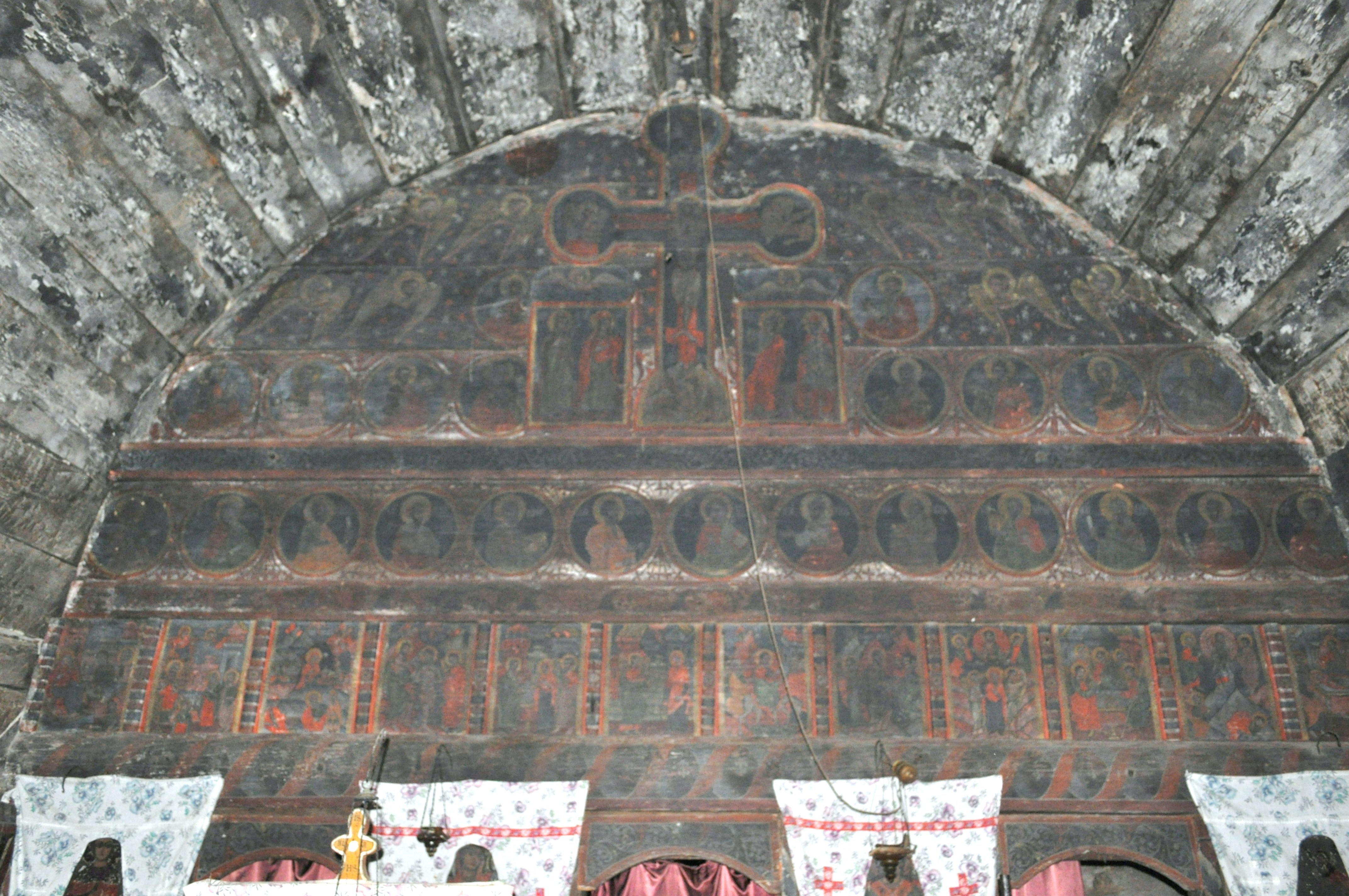 Biserica de lemn „Intrarea în Biserică a Maicii Domnului” din Crasna, județul Gorj